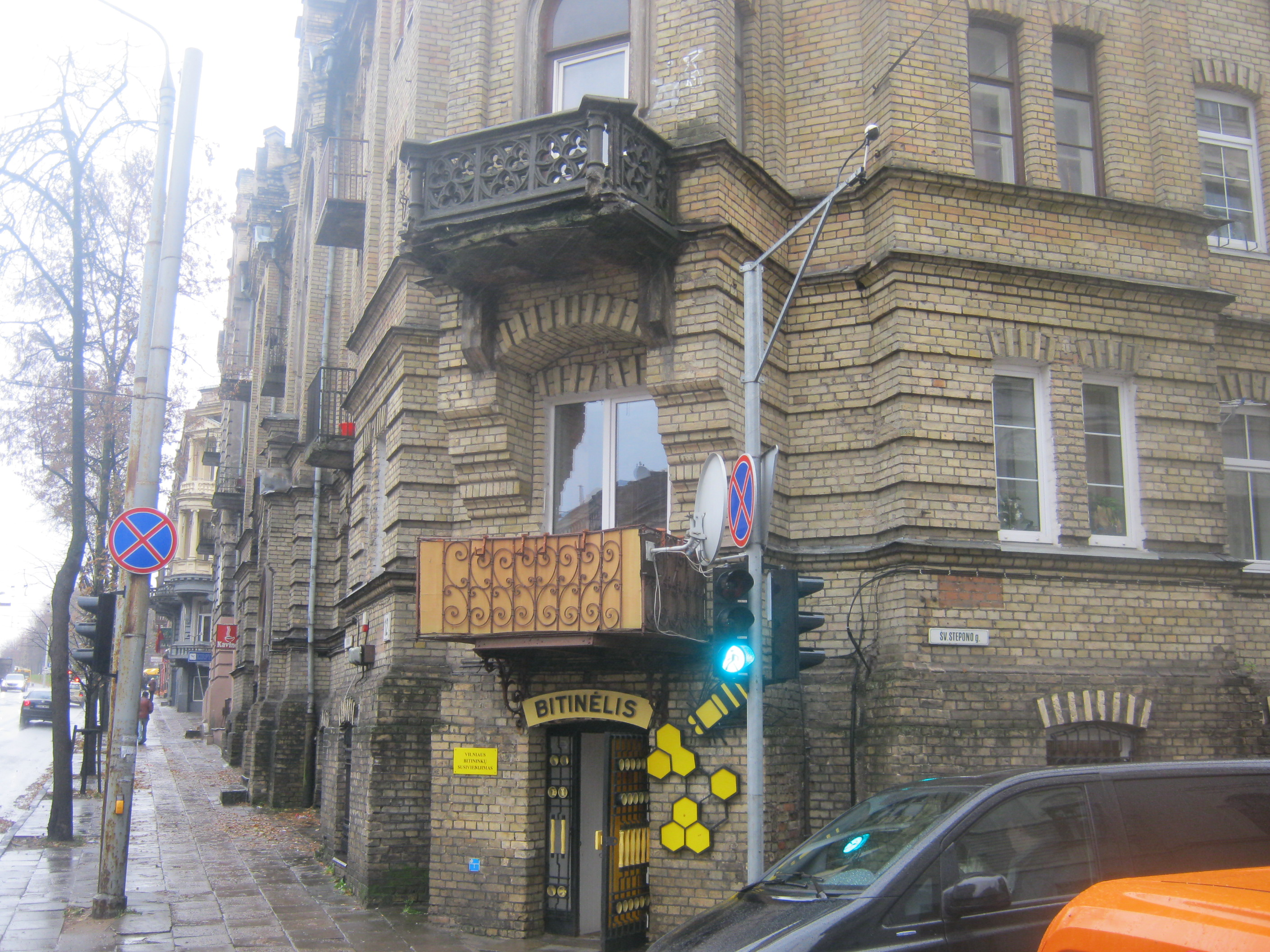 Bitinėlis - Vilniaus bitininkų susivienijimmas